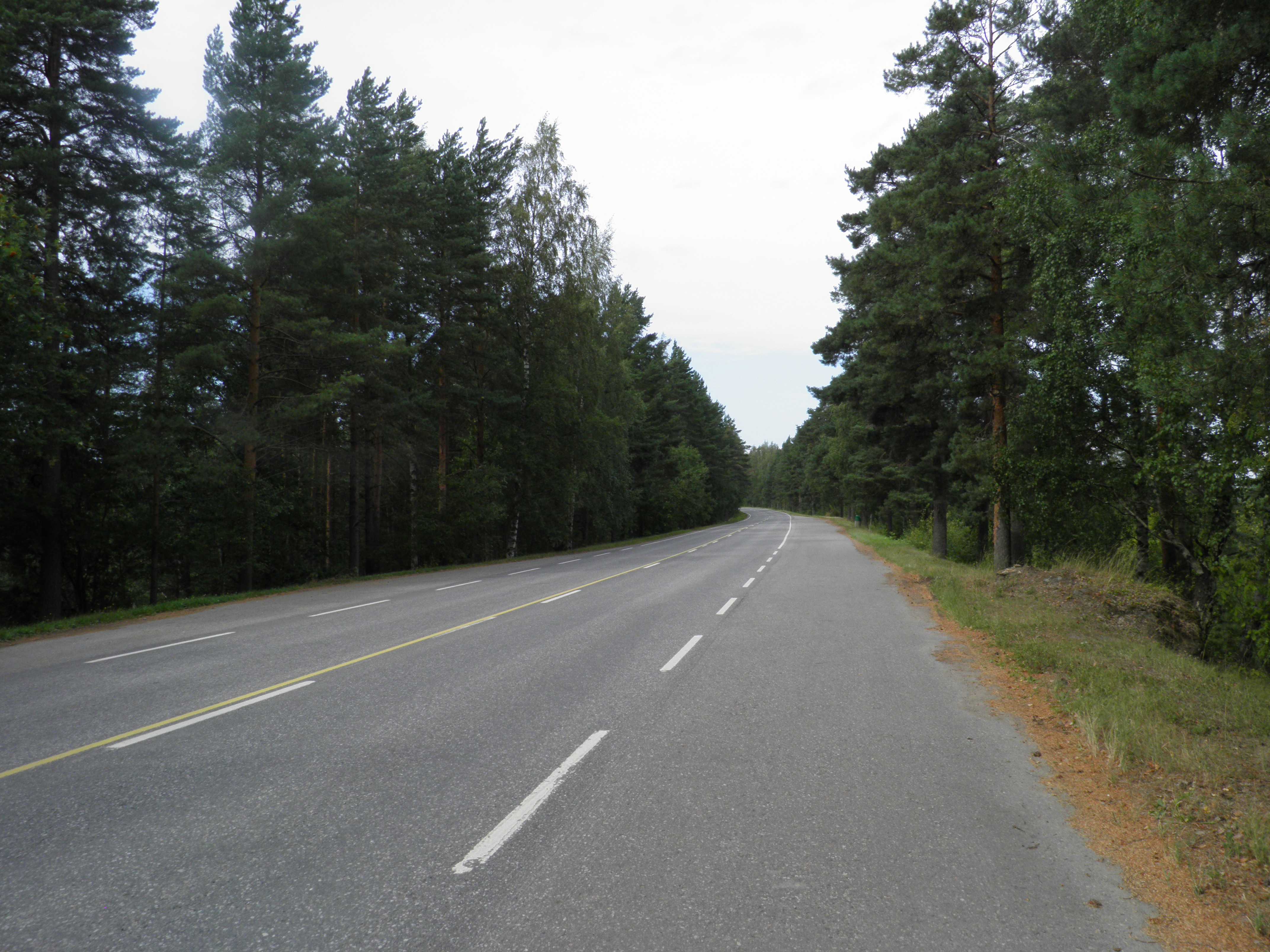 Seututie 339 Kuohunharjulla Kangasalla.